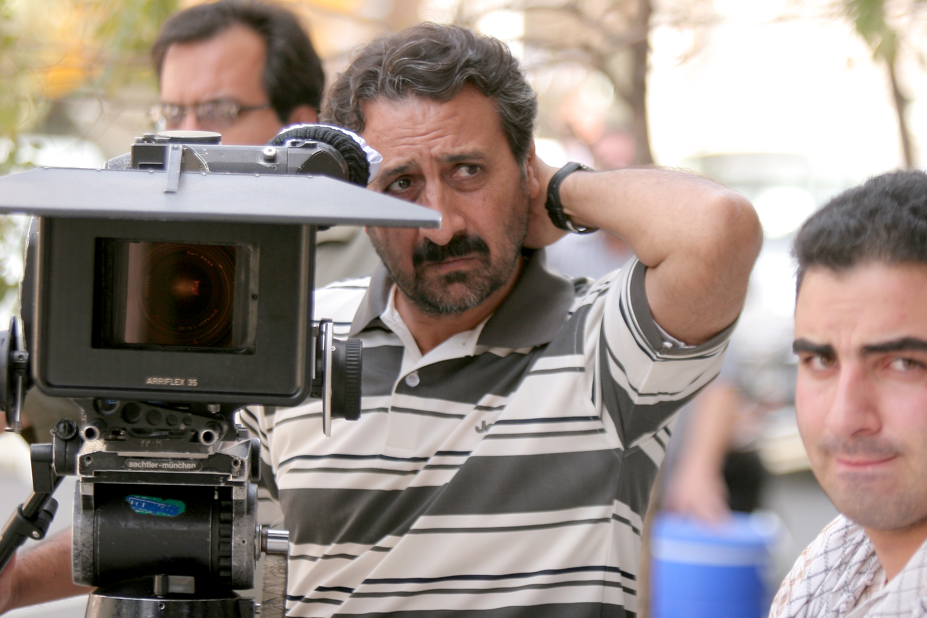 m.dormanesh